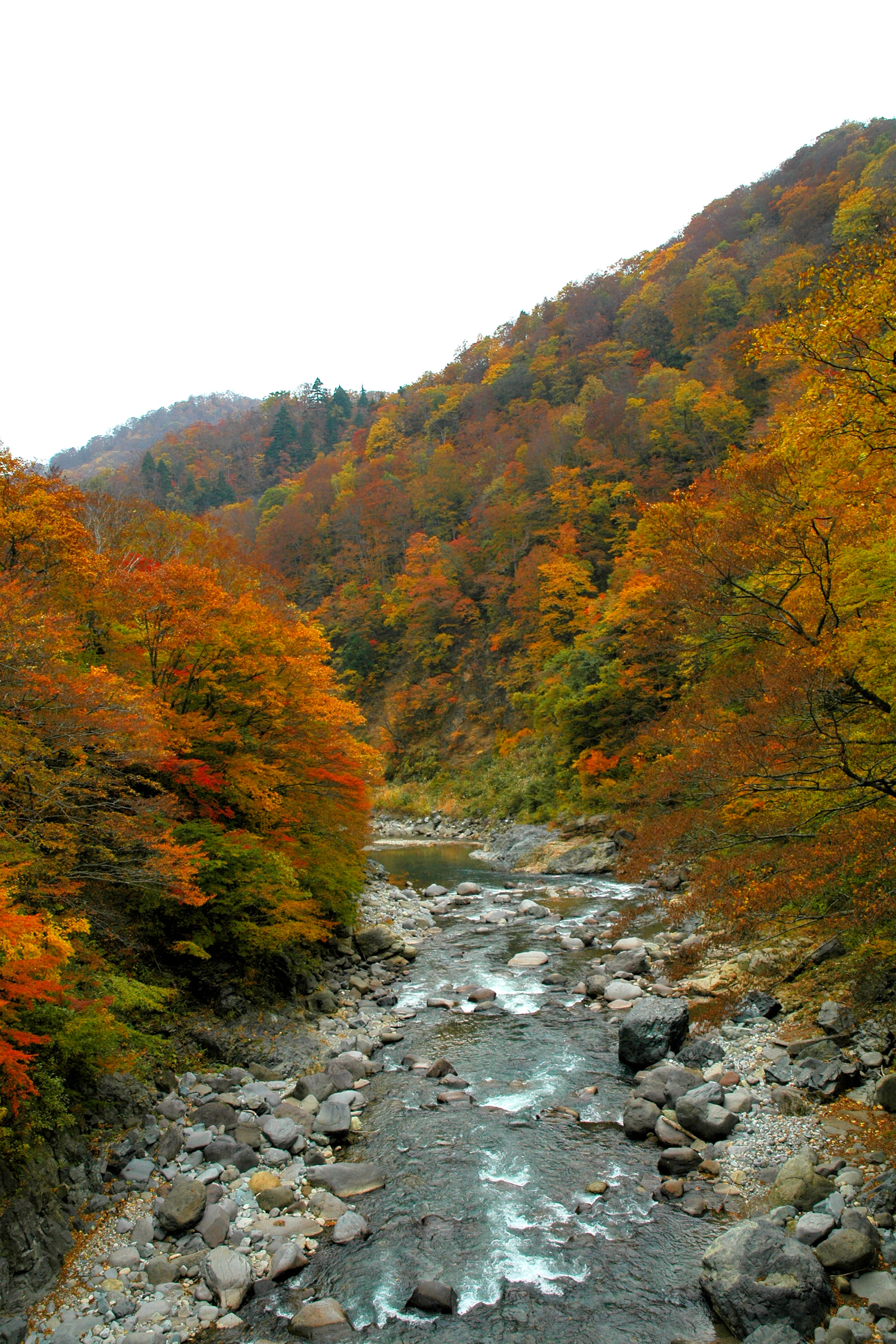 Akiyamago (秋山郷, one of 日本の秘境100選)